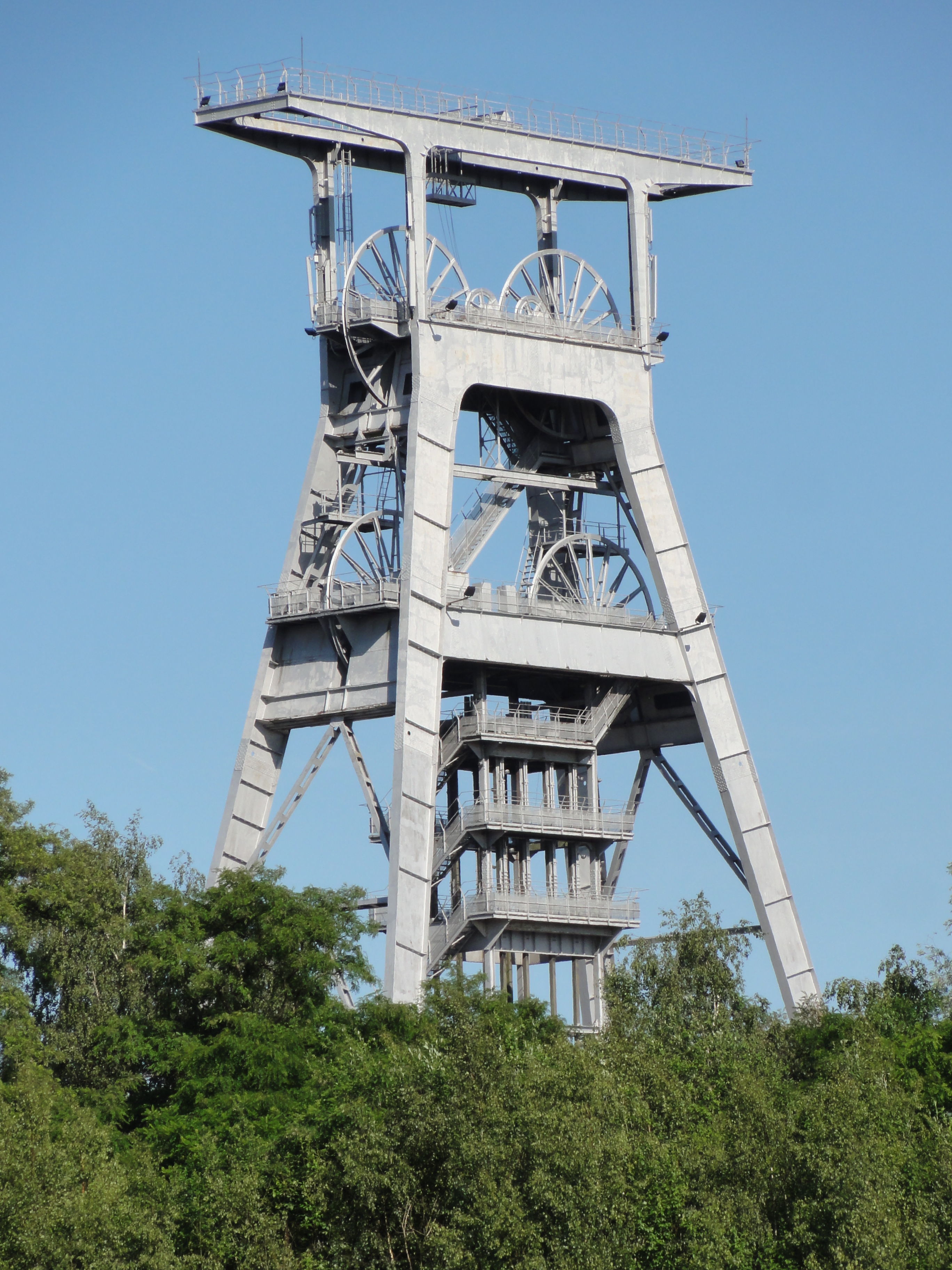 Ce document a été réalisé avec l’aimable autorisation de la Communauté d'agglomération de la Porte du Hainaut. Français | +/−